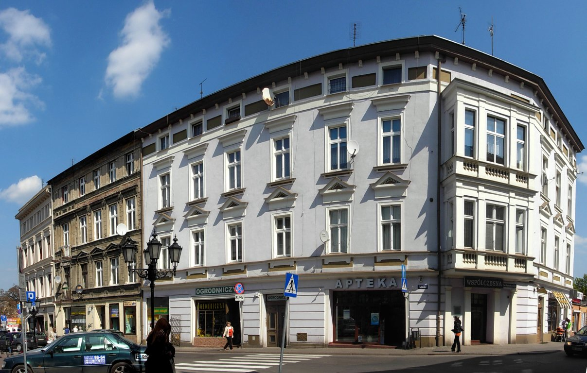 Kamienice przy ul. Podwale w Bydgoszczy (nr 11-15)